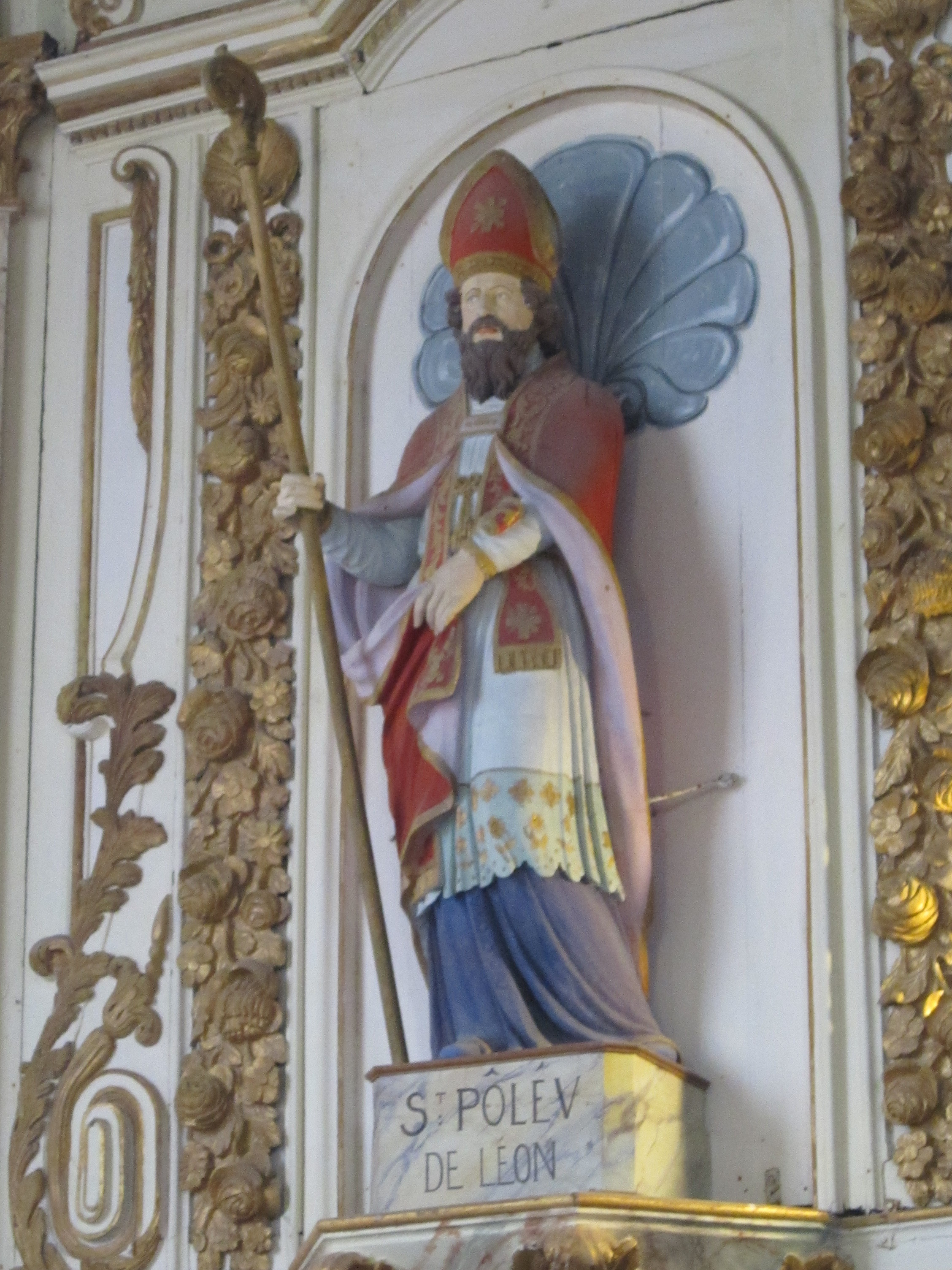 Statue de Pol-Aurélien dans l'église Saint-Germain de Pleyben